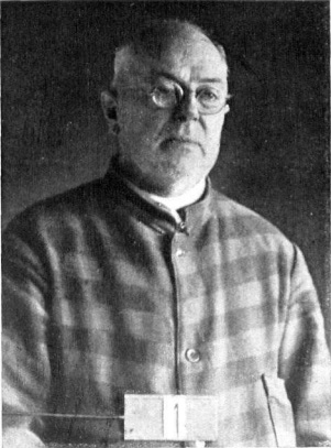 El homicida Mateo Banks